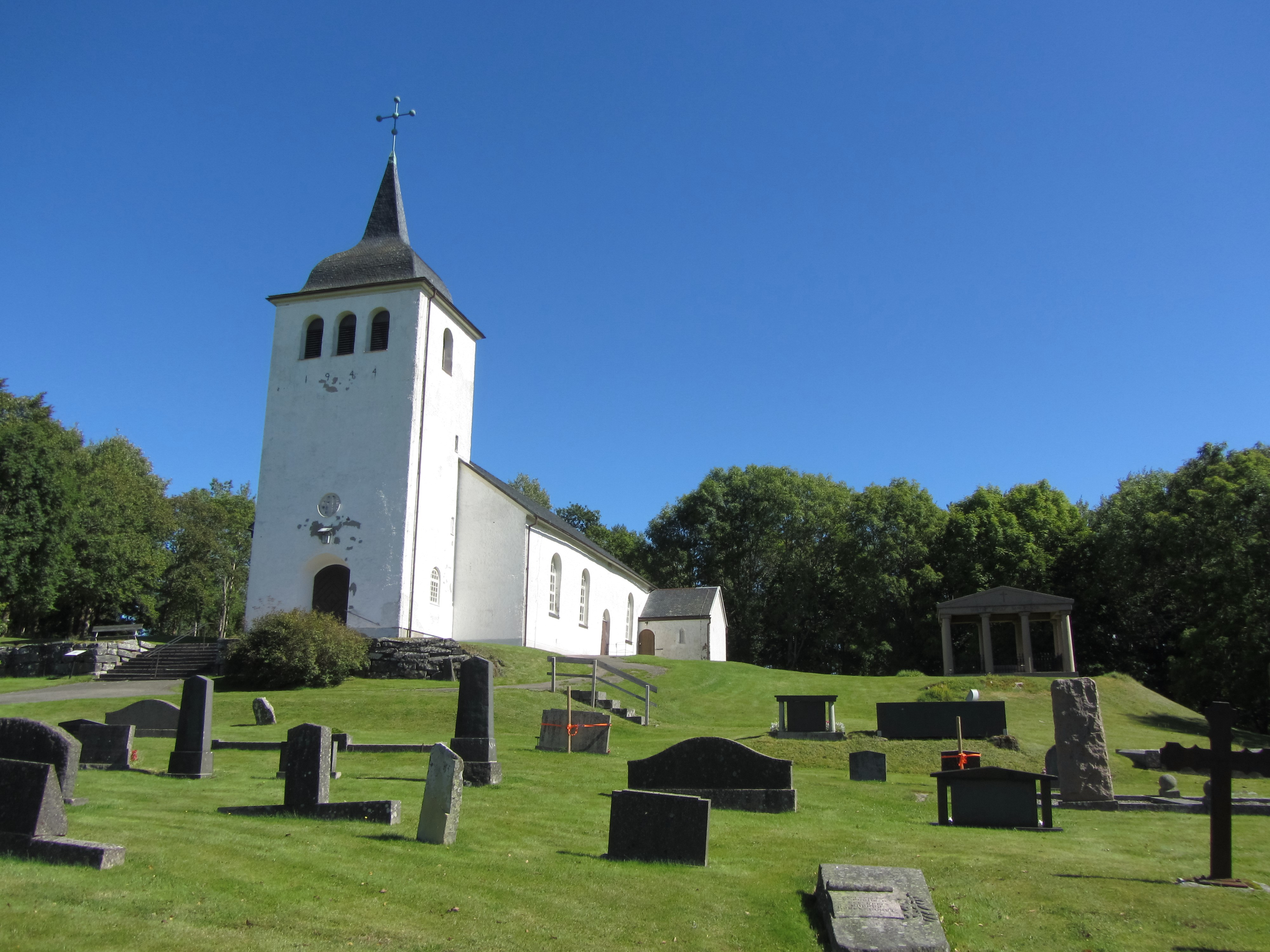 Rännelanda kyrka i Dalsland.